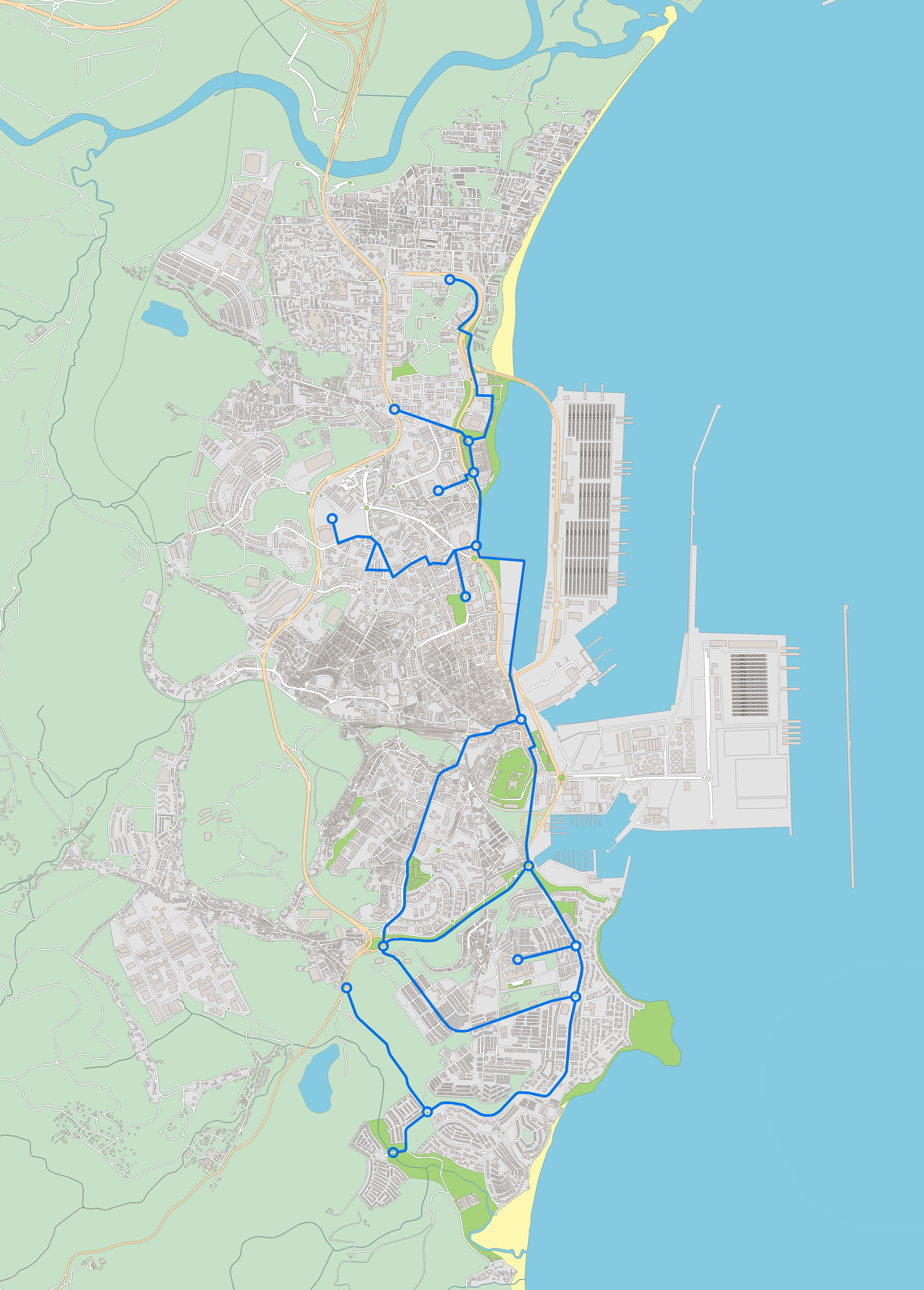 Plano de núcleo principal de la localidad de Algeciras, Andalucía, España, donde se indican los carriles bici ejecutados o en ejecución en 2016.